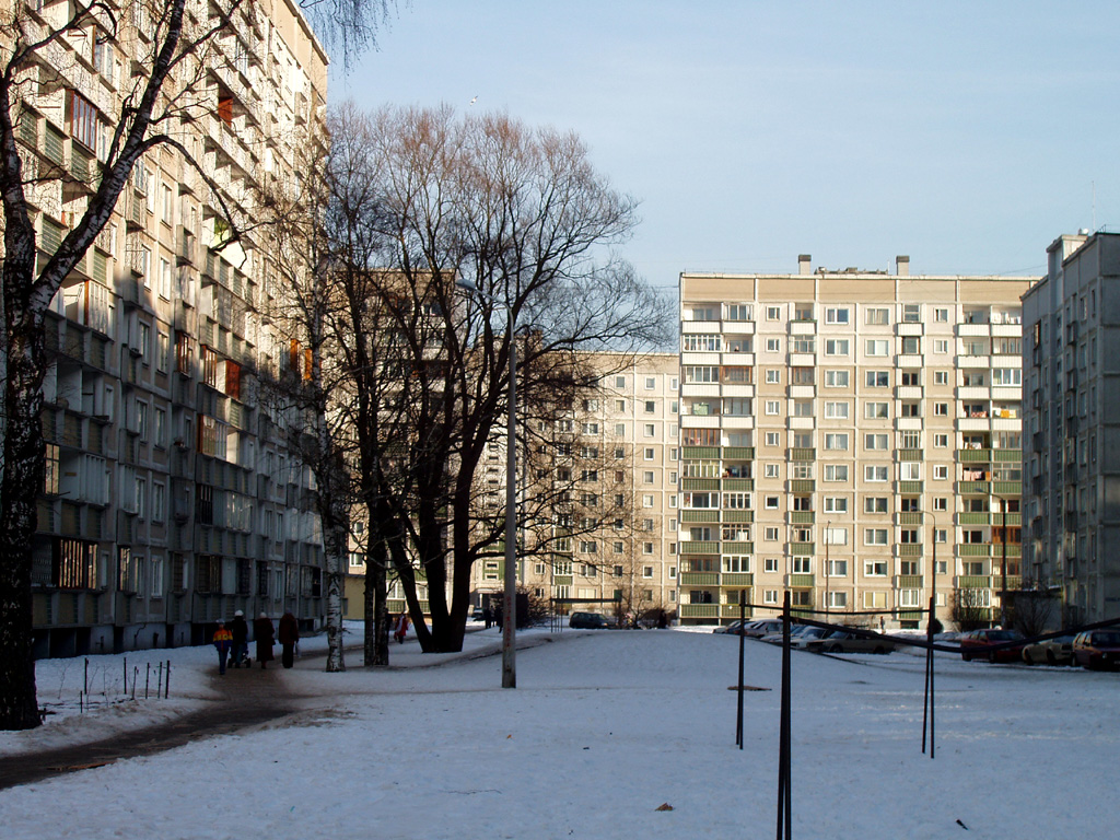 Construction typique de Ziepniekkalns